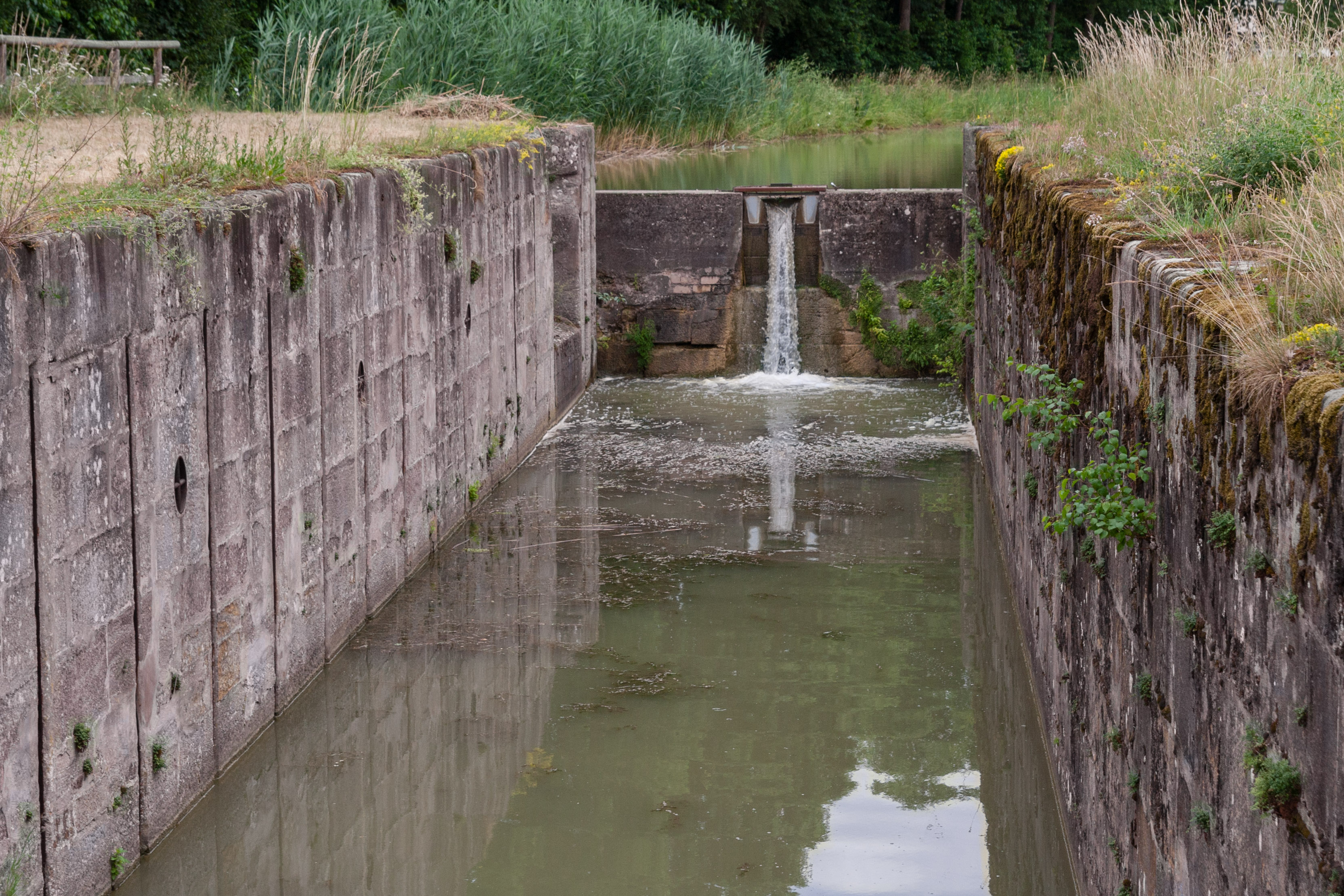 Ludwig-Donau-Main-Kanal, Schleuse 63, Röthenbach bei Sankt Wolfgang